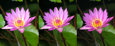 Bracketing exposició